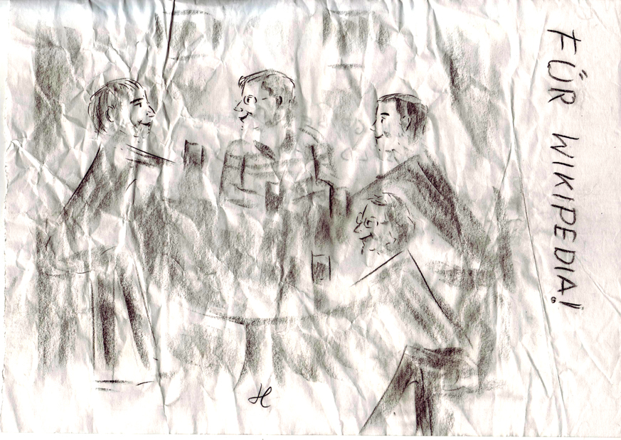 Die Wikipedianer Tilla, syrcro, Stefan und ulli purwin, 12. Bonner Stammtisch